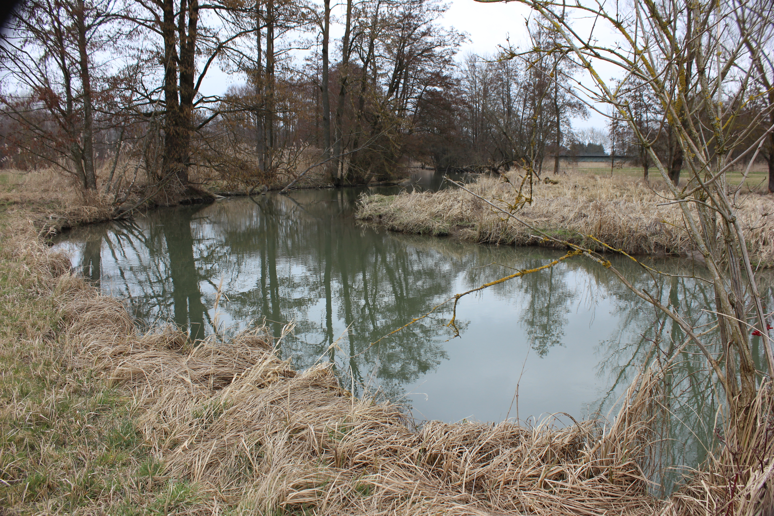 Die Mäanderschleife der Kleinen Laaber bei Perkam gehört zu den Geotopen im Landkreis Straubing-Bogen.